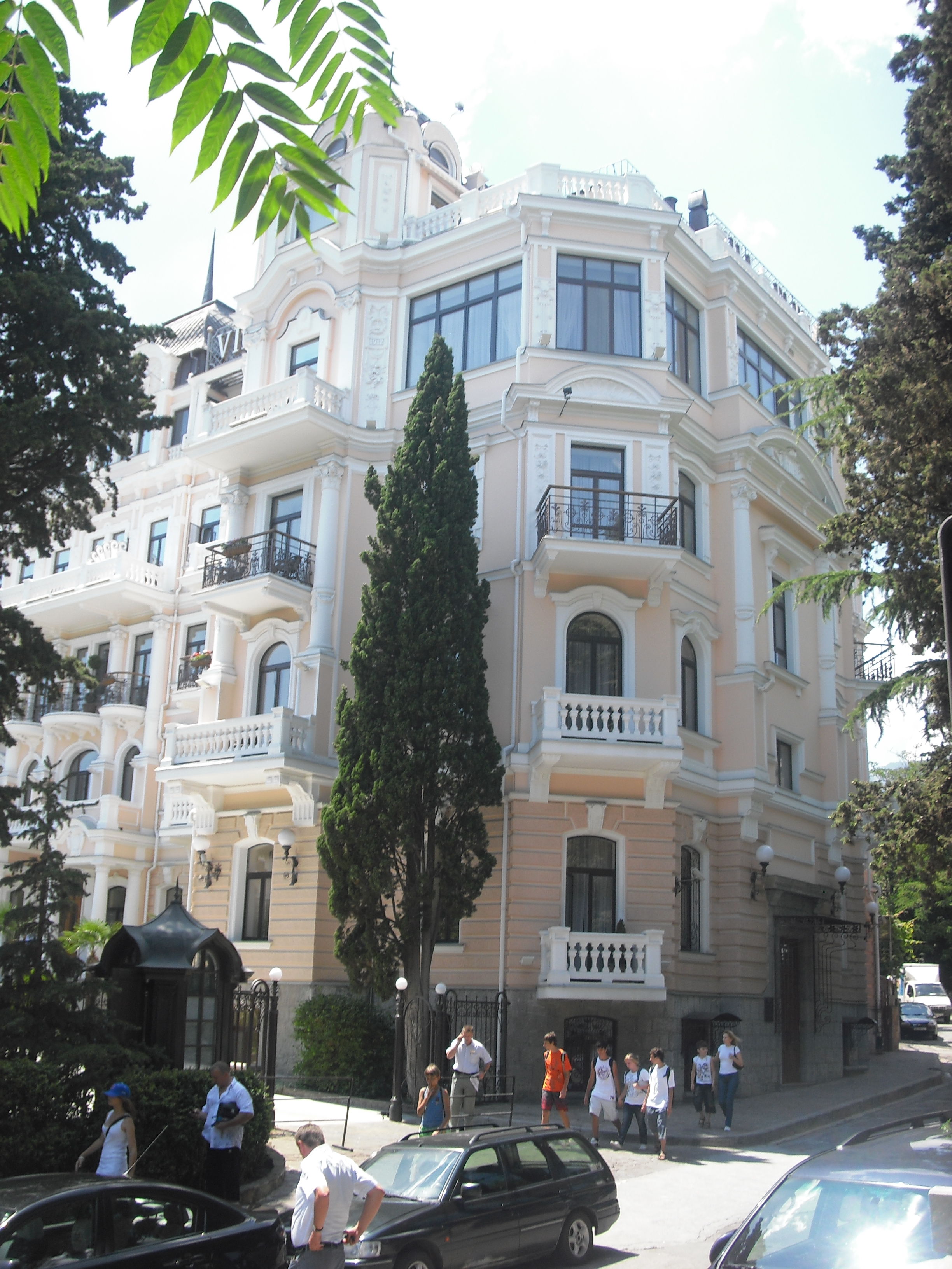 Гостиница "Вилла Елена" в Ялте